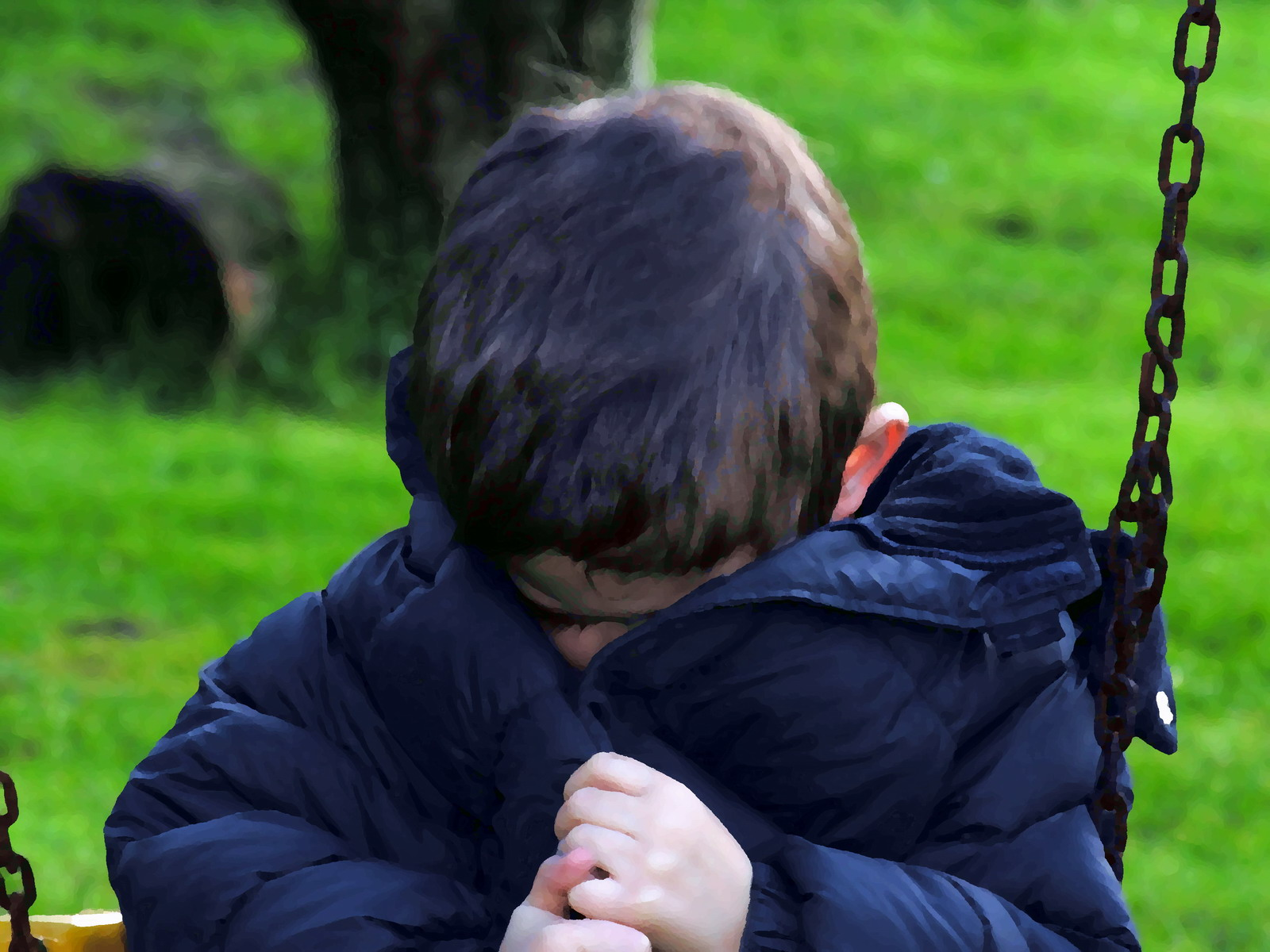 Tristeza, Vergoña. Infancia. Neno. Vergonza.